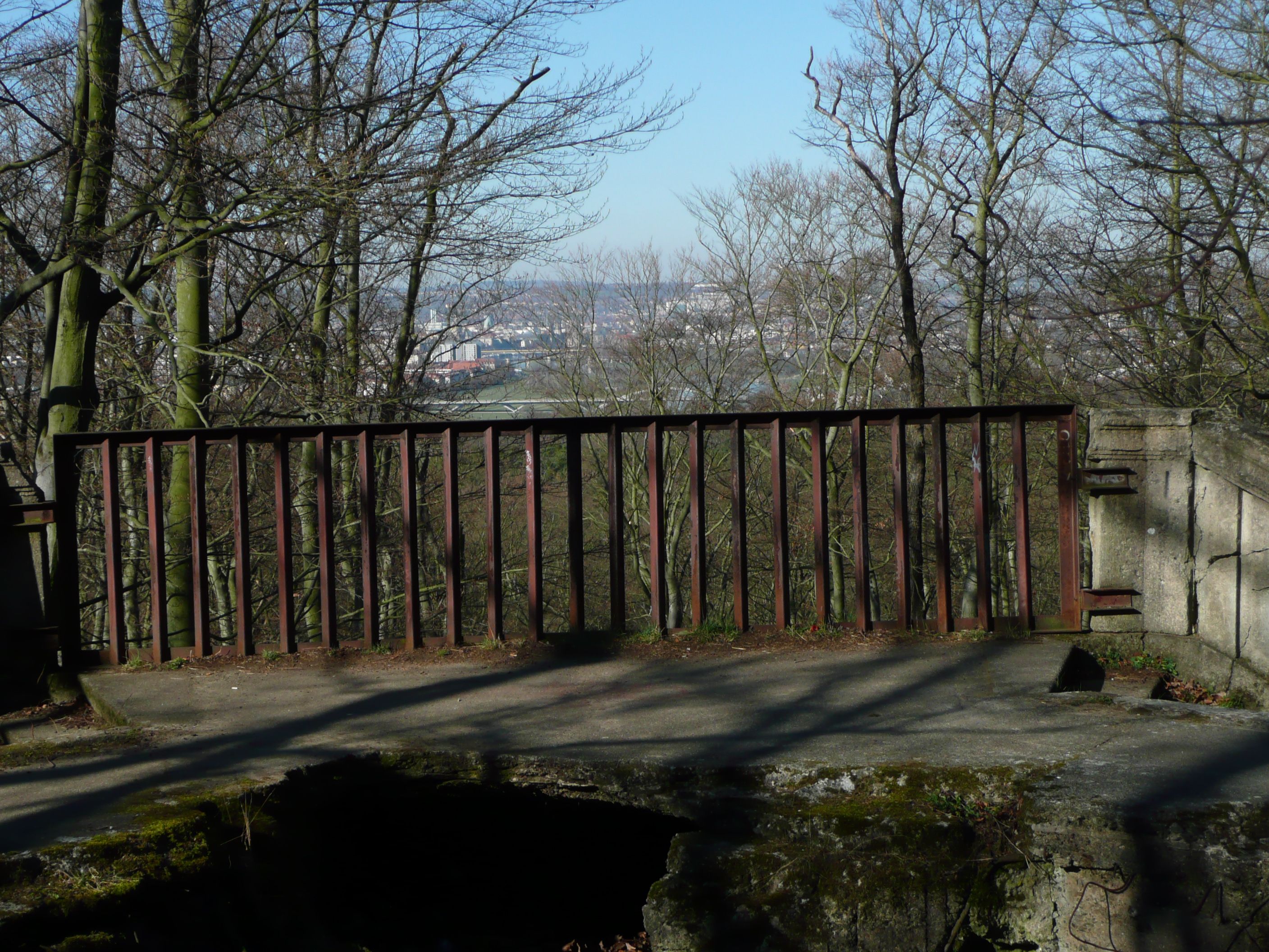 Aussicht auf Dresden mit Waldschlösschenbrücke vom Unterbau des Wolfshügelturmes